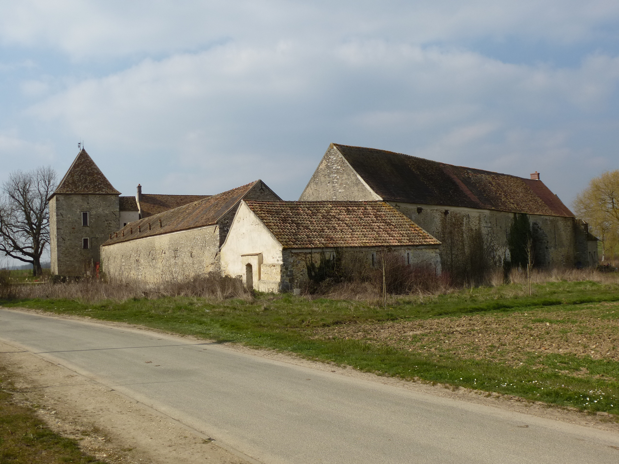 Ferme de Châteaupers. (Commune de Roinville, département de l'Essonne, région Île-de-France).